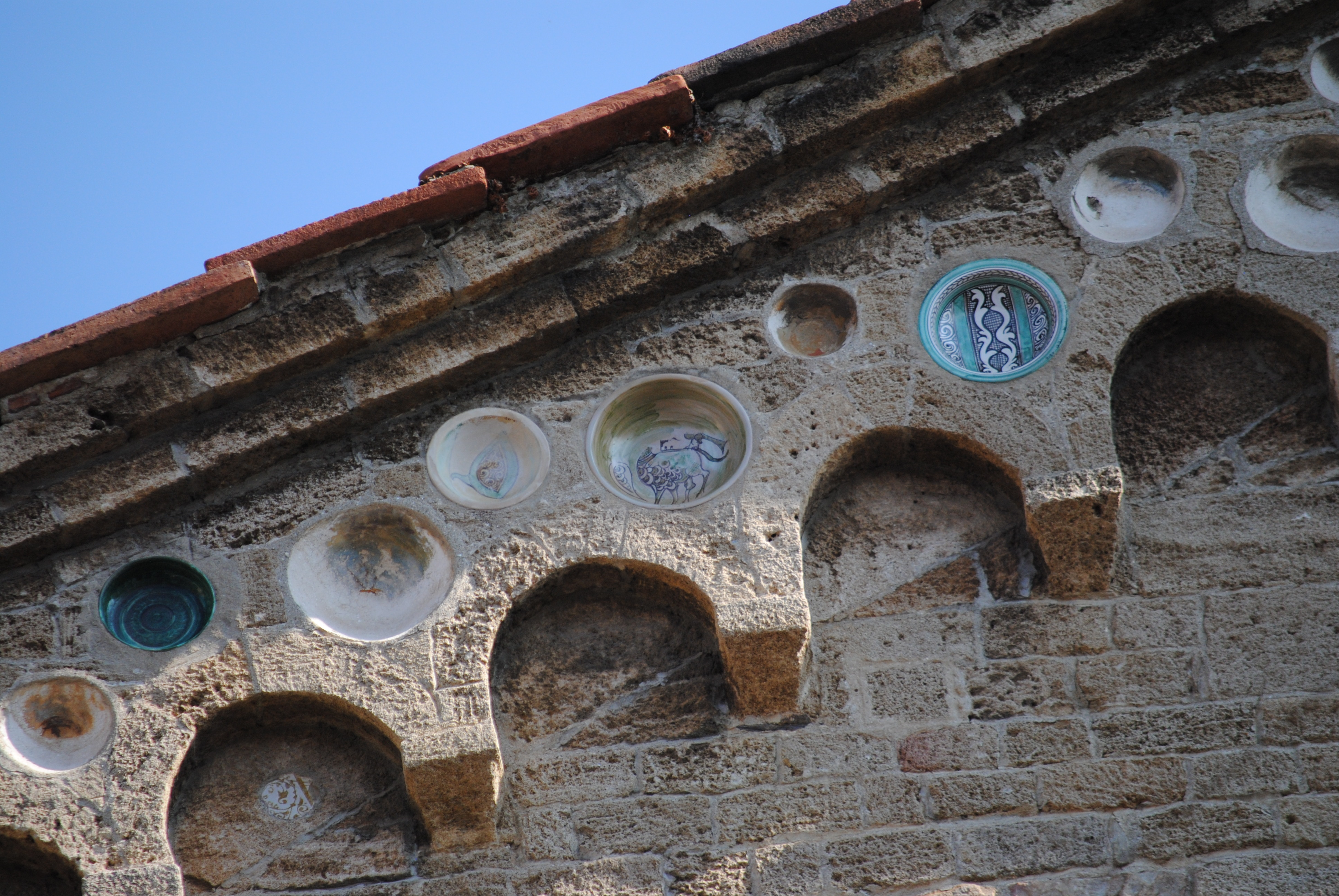 Facciata della chiesa di San Sisto (Pisa), navata centrale (dettaglio). I bacini ceramici di importazione sono posti tra gli spioventi del tetto e gli archi ciechi a tutto sesto. I pezzi originali sono stati rimossi per essere conservati a fini conservativi presso il Museo nazionale di San Matteo.